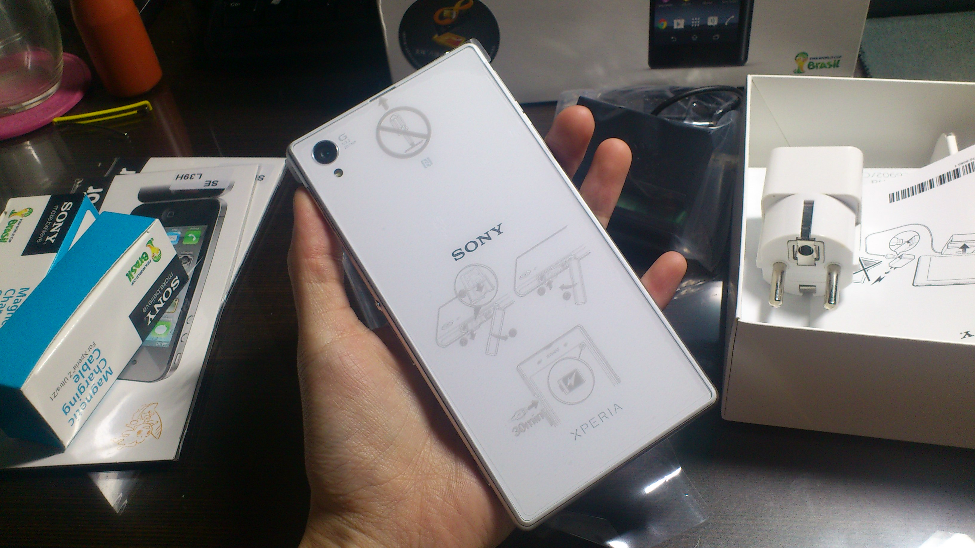 위 사진은 Sony Xperia Z 후면사진으로서 사진을찍으신분이 위키미디어에 업로드를 원하시고 위키미디어에 파일이 공유되는것을 원하여 합의 후 올림